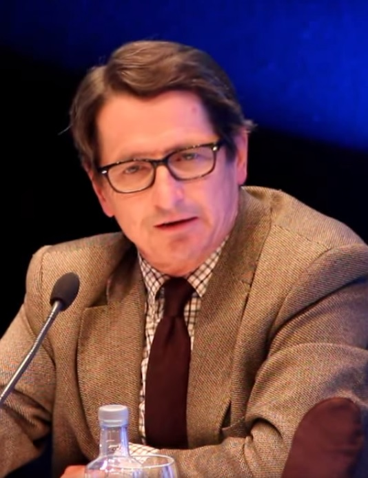 Manuel de la Rocha, Mesa de debate “La conquista del espacio público, 12 de marzo de 2015.